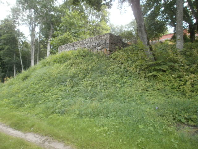 Mäe põhjakülg. Mõisa ajal rajatud eenduv platvorm.